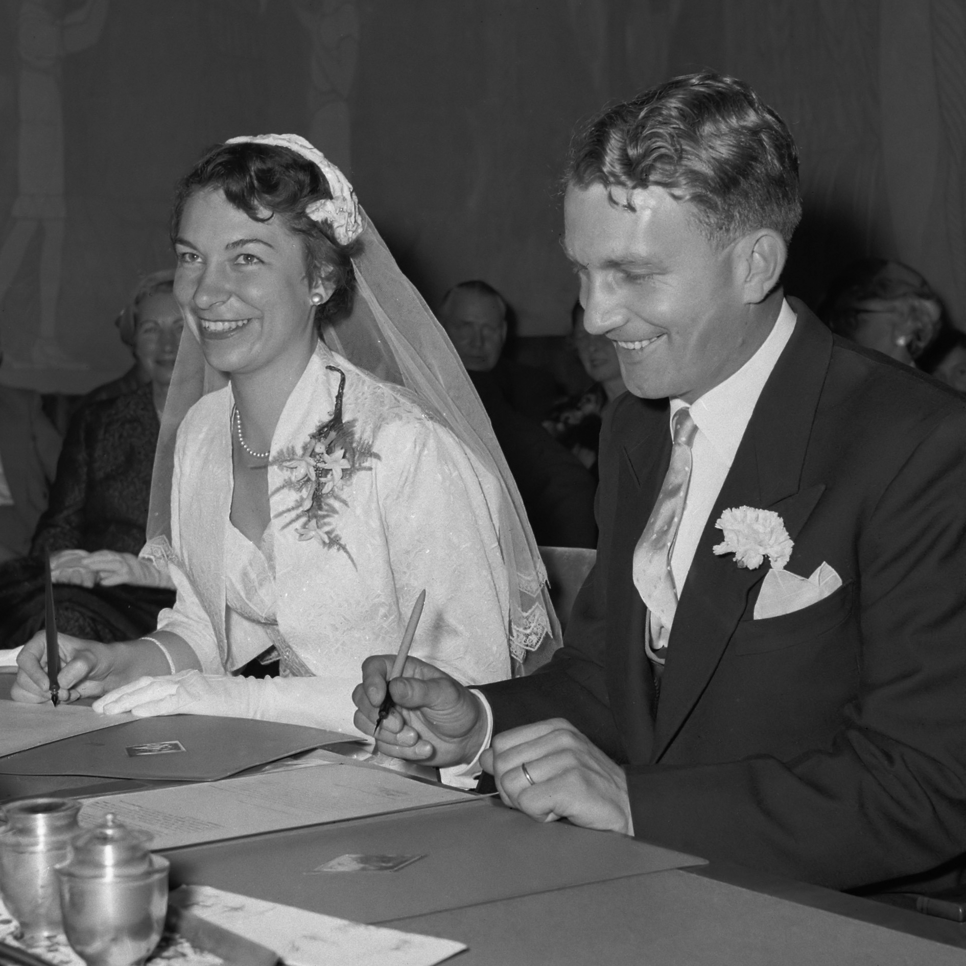 Huwelijk Kermeth Dancy (Held Flying Enterprise ) met Nelly van der Tempel 22 september 1956